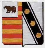 Vlag van Heusden-Zolder.